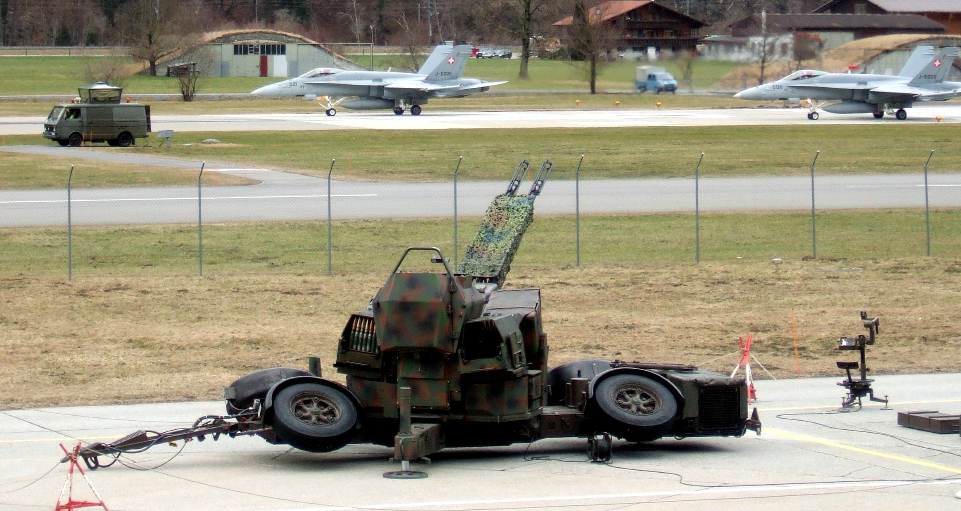 35mm Oerlikon